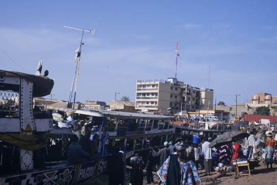 port de Mopti au Mali Photo Olivier EPRON